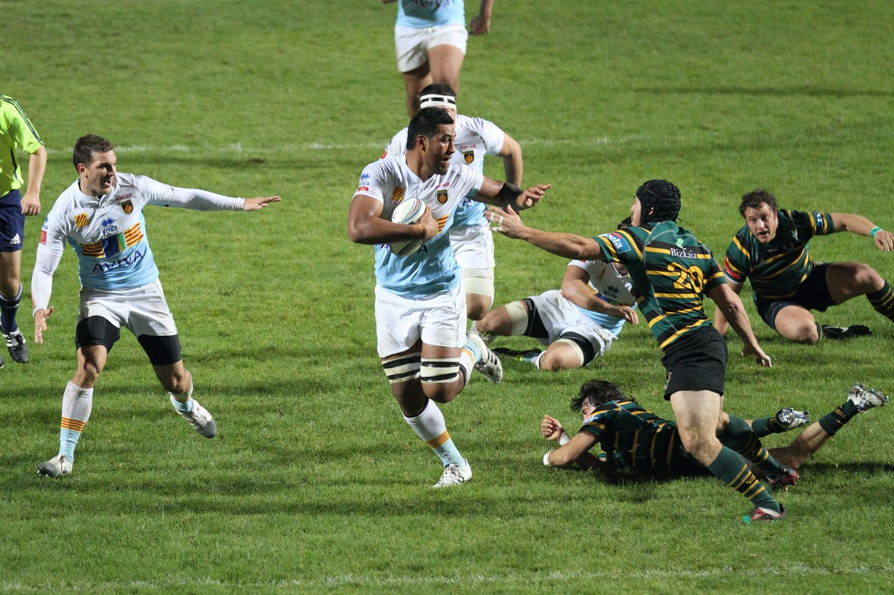 Charge de Sebastien Vahaamahina